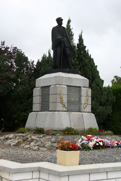 Statue du Maréchal Ferdinand Foch à Bouchavesnes-Bergen.